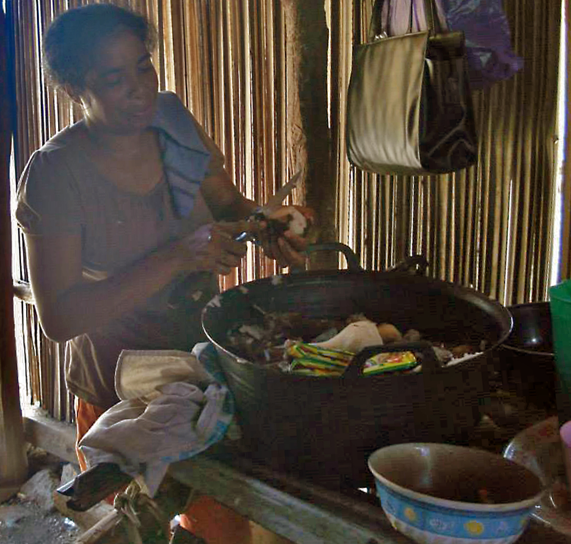 Fatuberlio, Manufahi